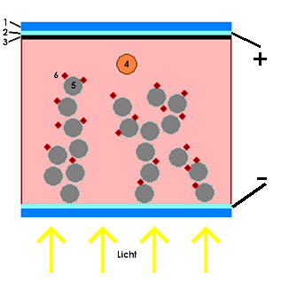 Een schematische weergave van de werking van de Grätzel zonnecel